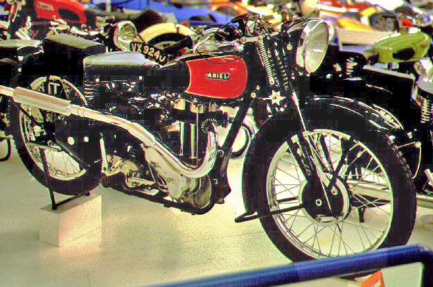 Sujet:Ariel "Red Hunter" Source:Fotograf Kassander der Minoer opgehellt vum Cornischong